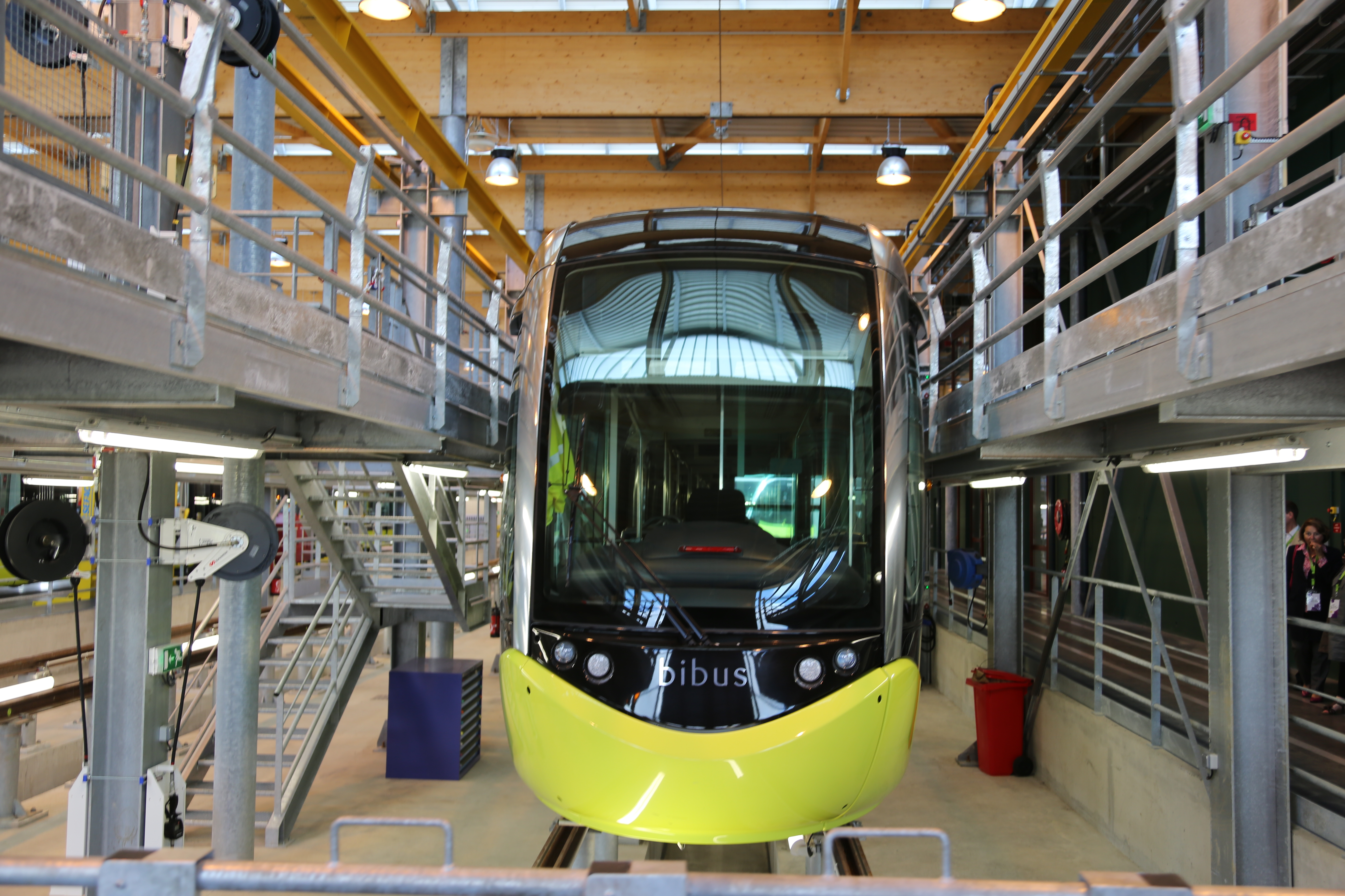 Photos autour de l'inauguration du Tramway à Brest le 23 juin 2012